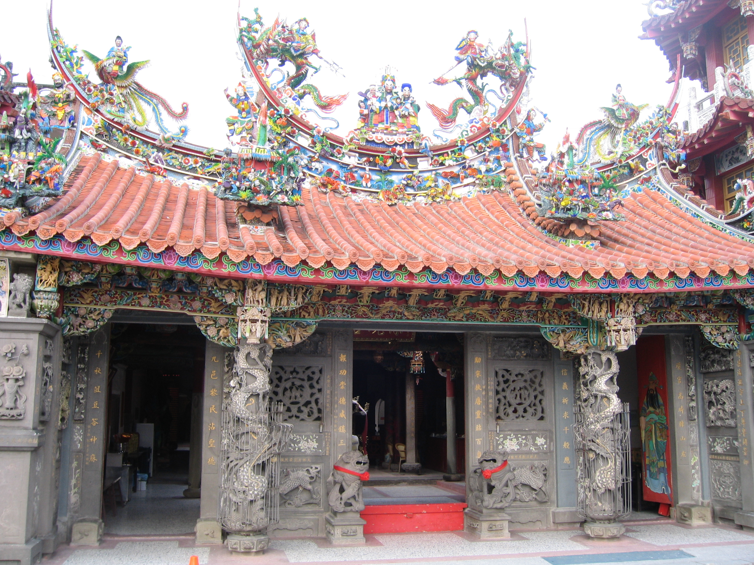 雲林大埤三山國王廟